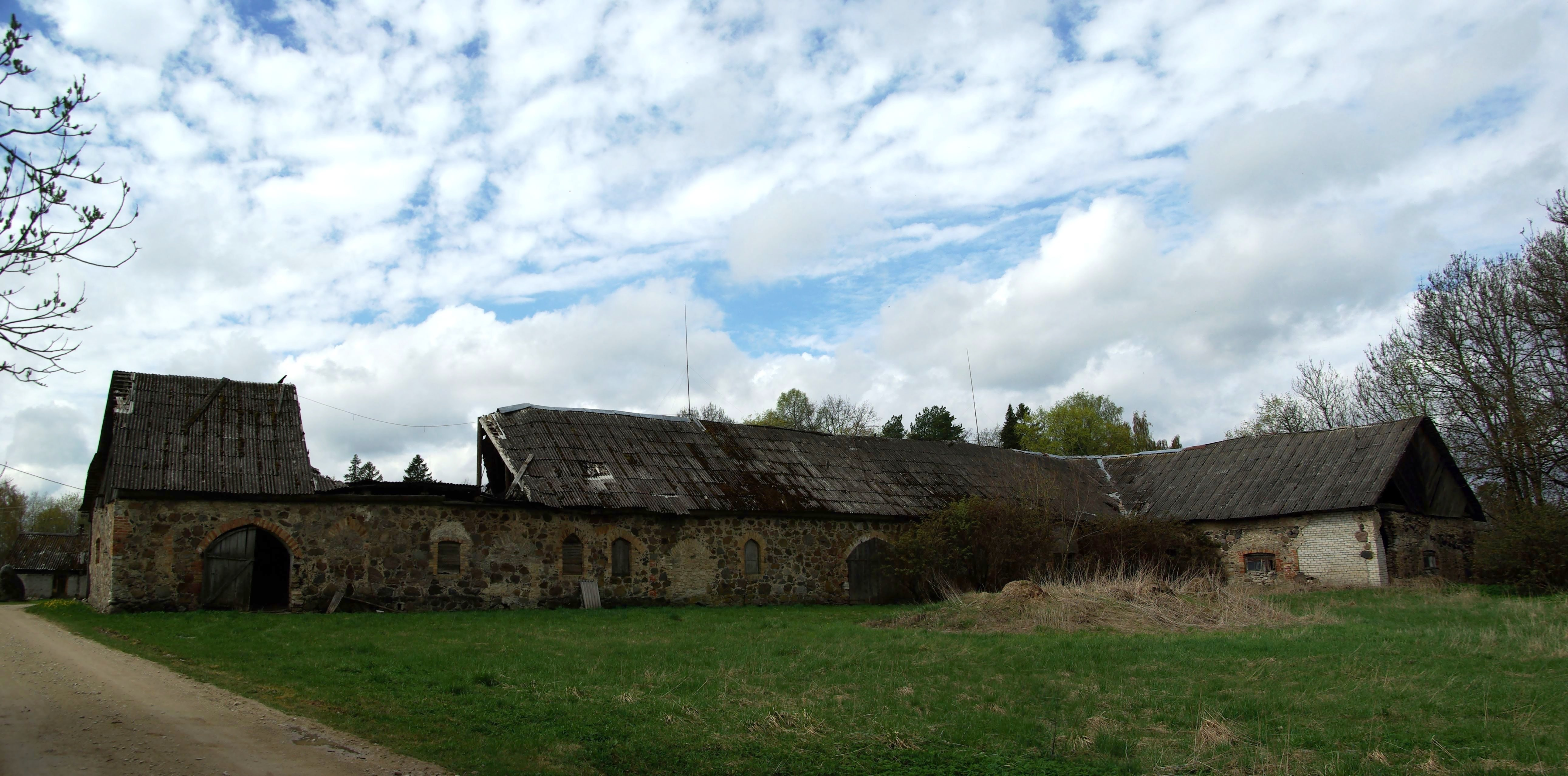 Aavere mõisa karjakastell